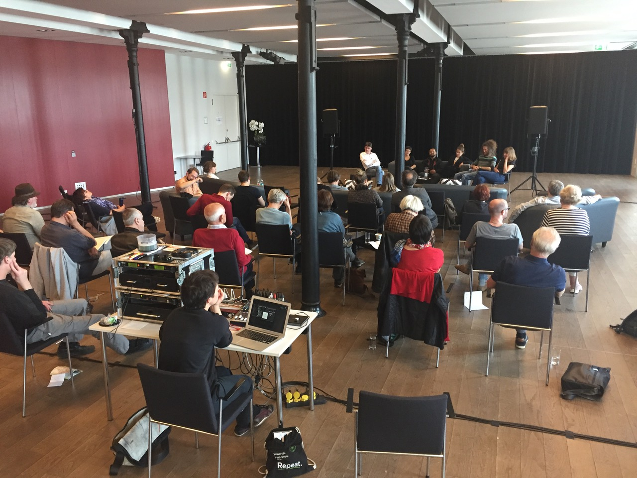 Bei den Hörspieltagen